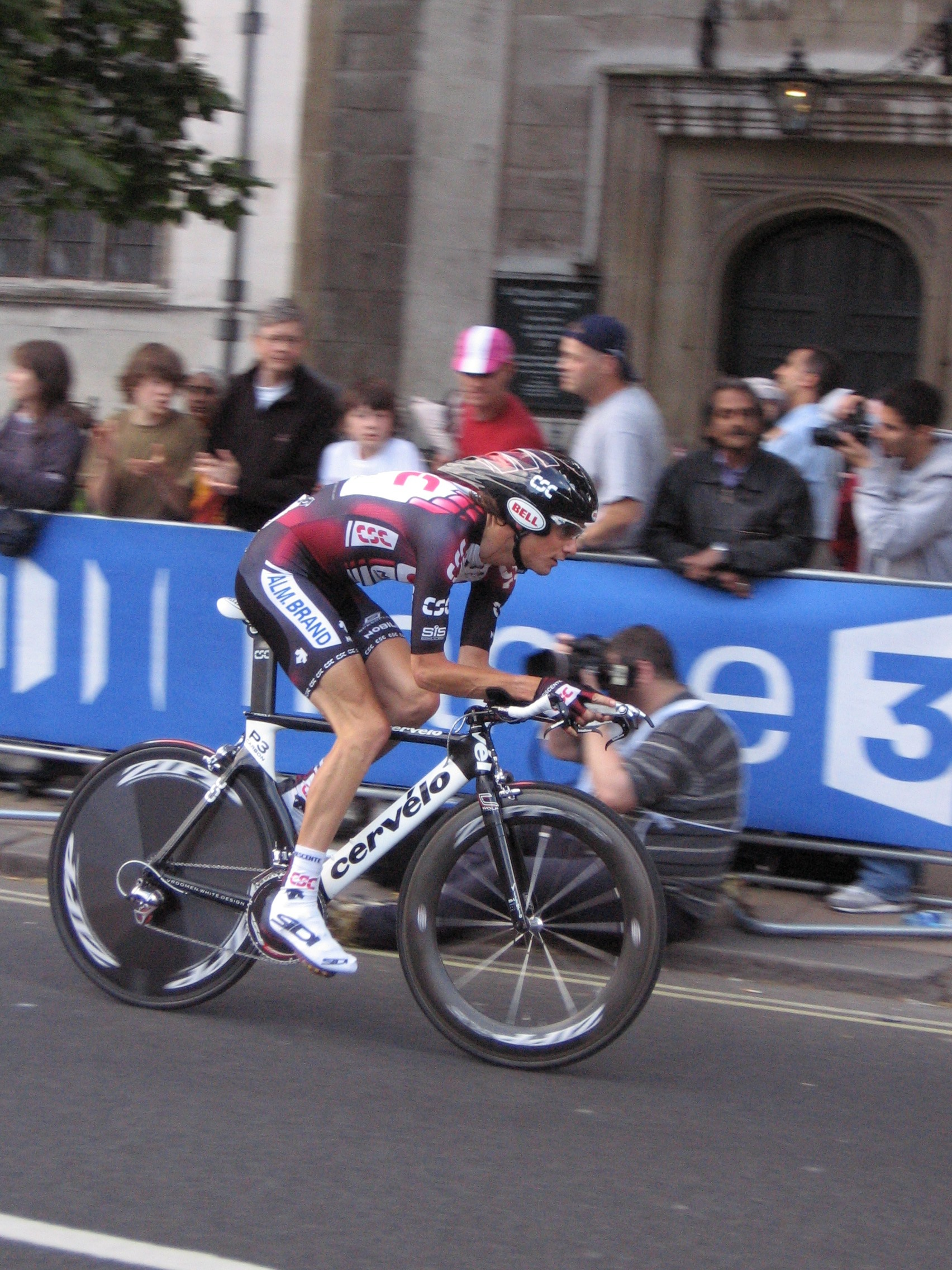 Frank Schleck